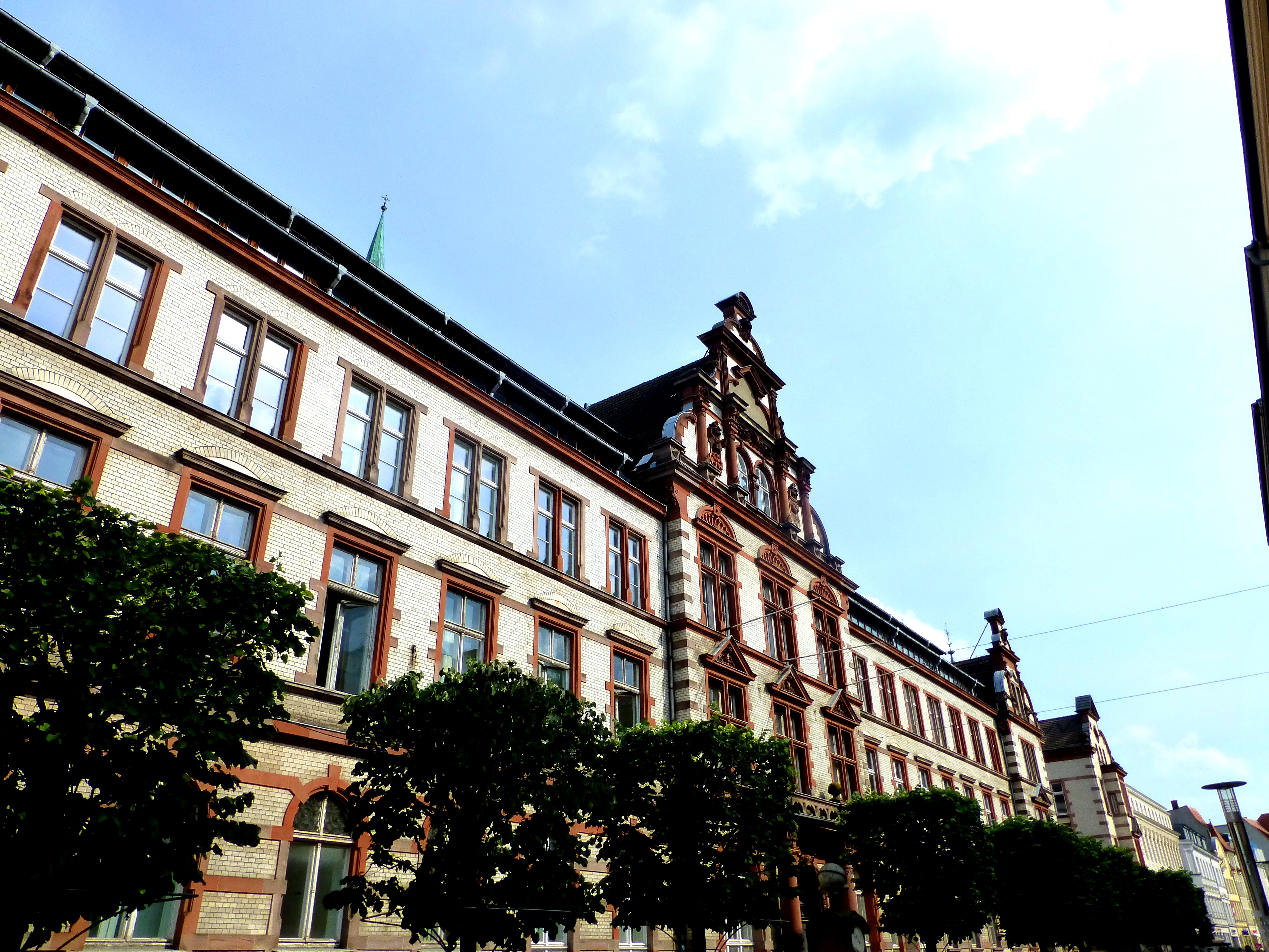 Schwerin – Altes Hauptpostamt